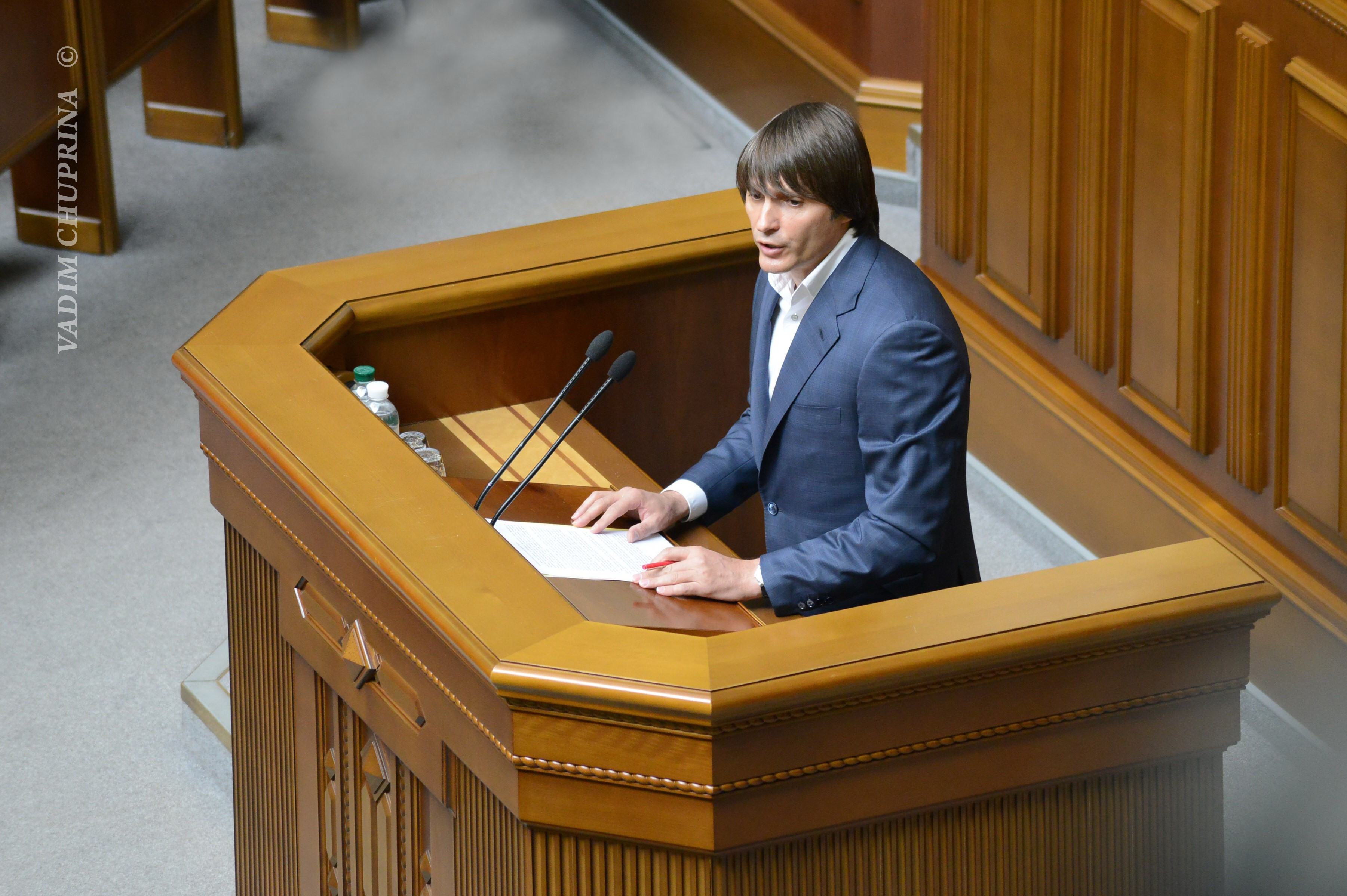 ВЕРХОВНА РАДА УКРАЇНИ 2015 фотограф Вадим Чуприна